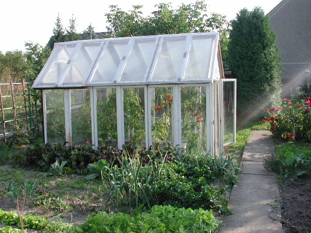 Ein normales Gartengewächshaus in einem Kleingarten in Schlesien, geknipst bei Nachbarn, die einen Kleingarten besitzen und dieses wunderschöne Gewächshaus haben.